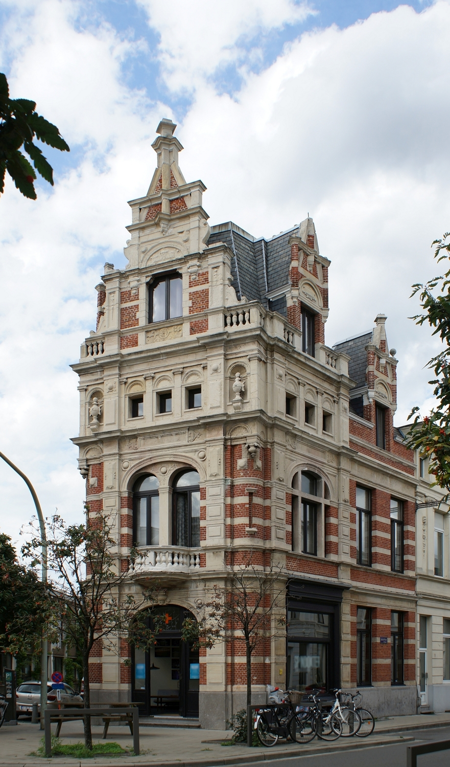 Antwerpen, Lange Altaarstraat 29 - Hoekpand in neo-Vlaamserenaissance-stijl ontworpen door architect Ernest Dieltiens.